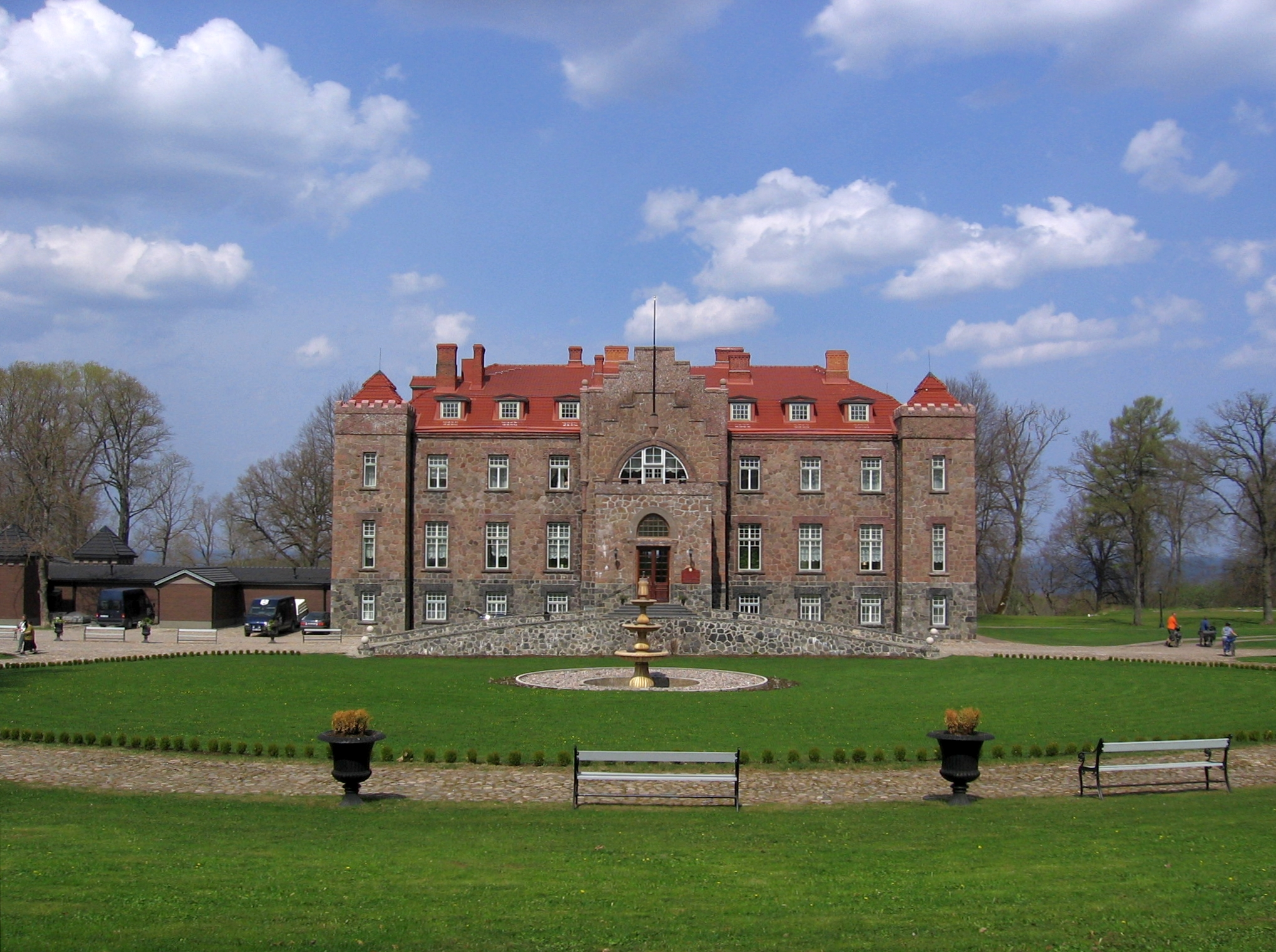 Kalvi mõisa peahoone, 1908-1912